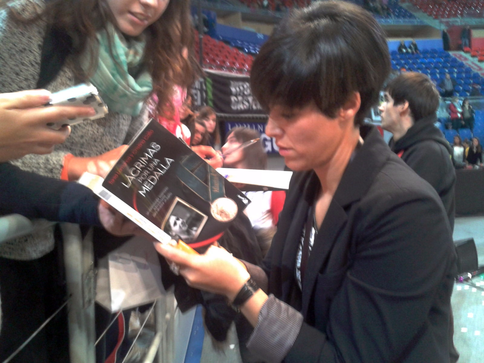 La exgimnasta rítmica española Tania Lamarca firmando un ejemplar de su libro Lágrimas por una medalla durante la Gala Euskalgym en Vitoria el 8 de noviembre de 2014.